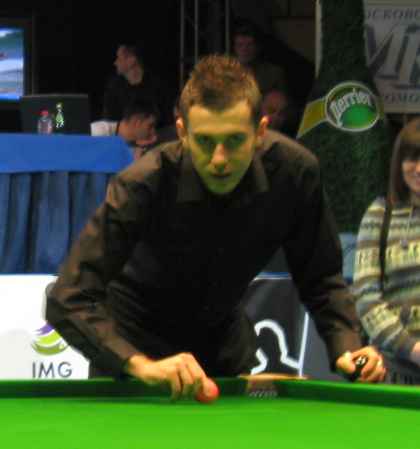 Туринир World Series of Snooker в Москве